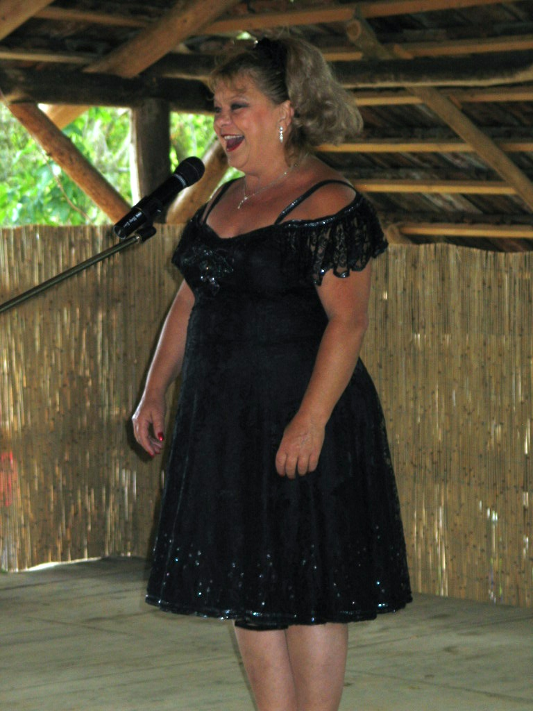 Oszvald Marika magyar színésznő, operetténekes, a Halhatatlanok Társulatának örökös tagja